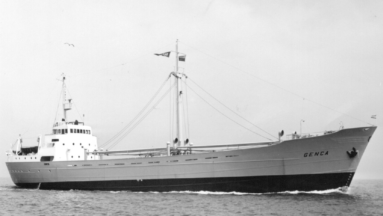 Nederlands Het schip de Genca met als bouwjaar 1960. Het schip is op de foto gezet in de periode 1961-1968 door mijn vader